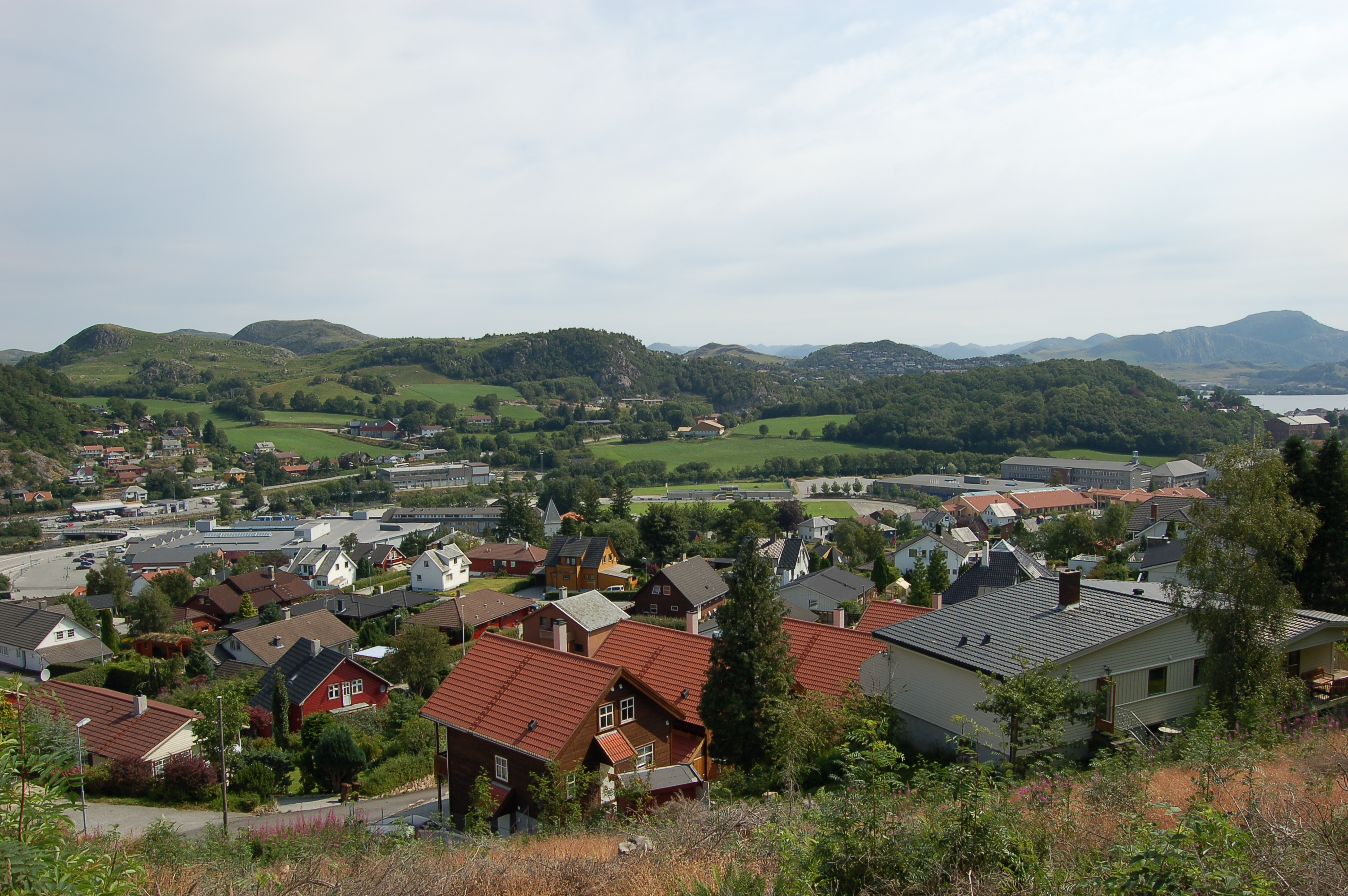 Ålgård, Norway